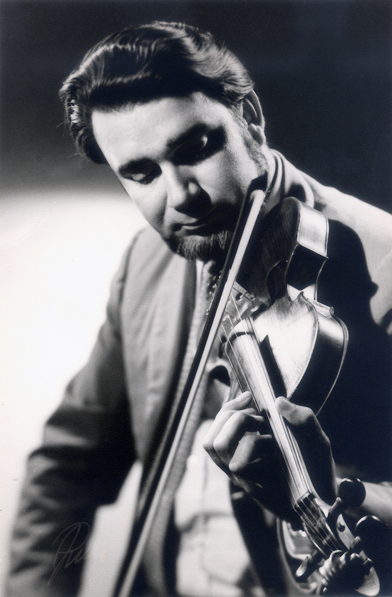 Rafael Lozano en una foto de estudio realizada por Foto Luis